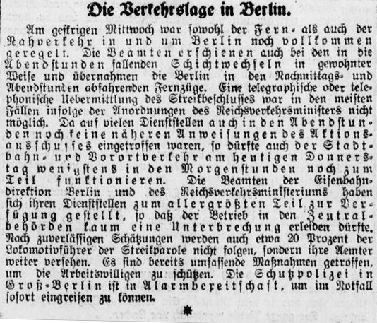 Die Berliner Volkszeitung gibt in ihrer Morgenausgabe eine Verkehrsprognose ab. Diese an sich unübliche Meldung kam aufgrund eines Streiks in Berlin zustande. Die Lokomotivführer, so der Artikel, würden vermutlich nicht streiken. Link zu der Ausgabe in der Europeana